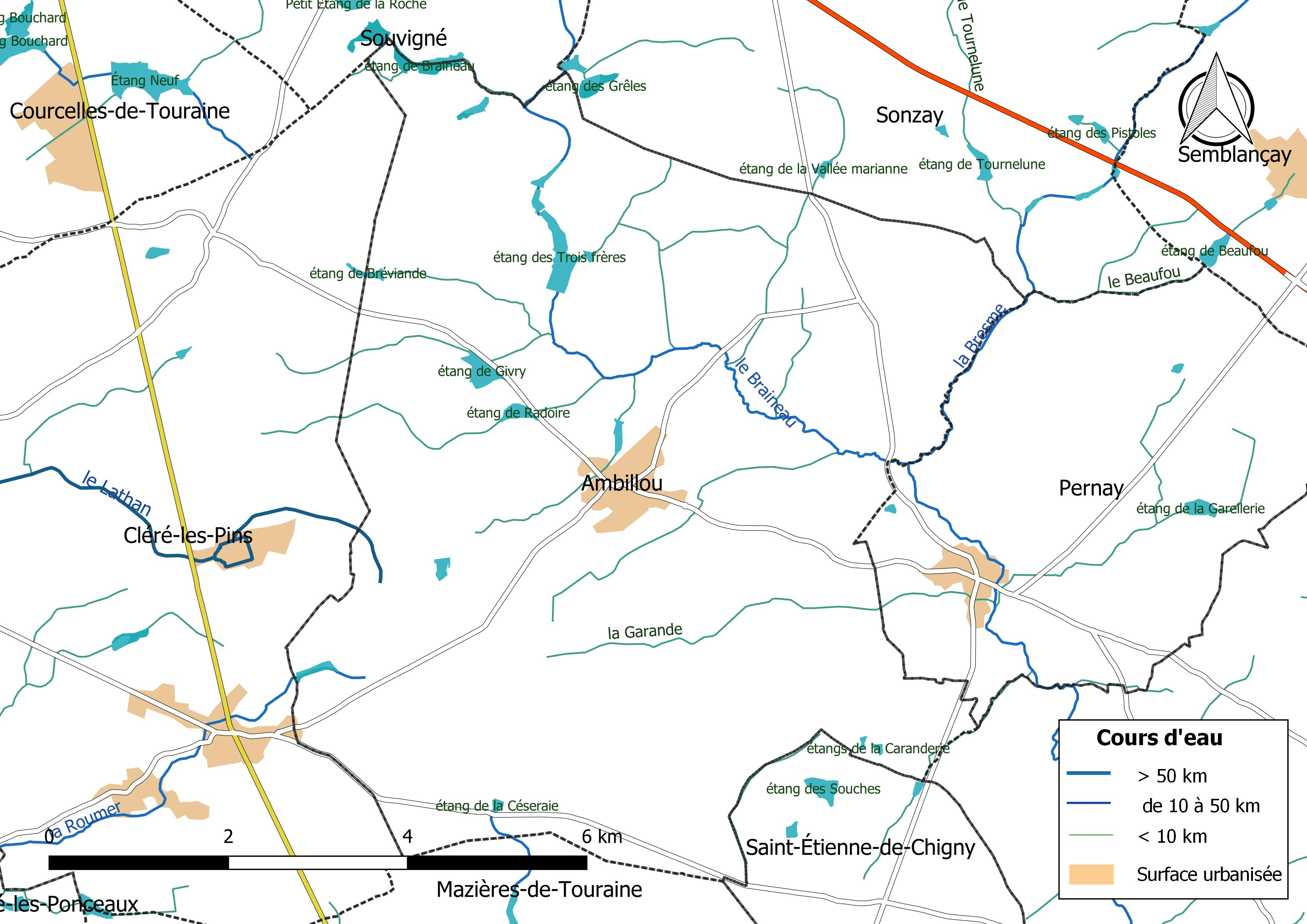 Carte du réseau hydrographique de la commune de Ambillou (France).